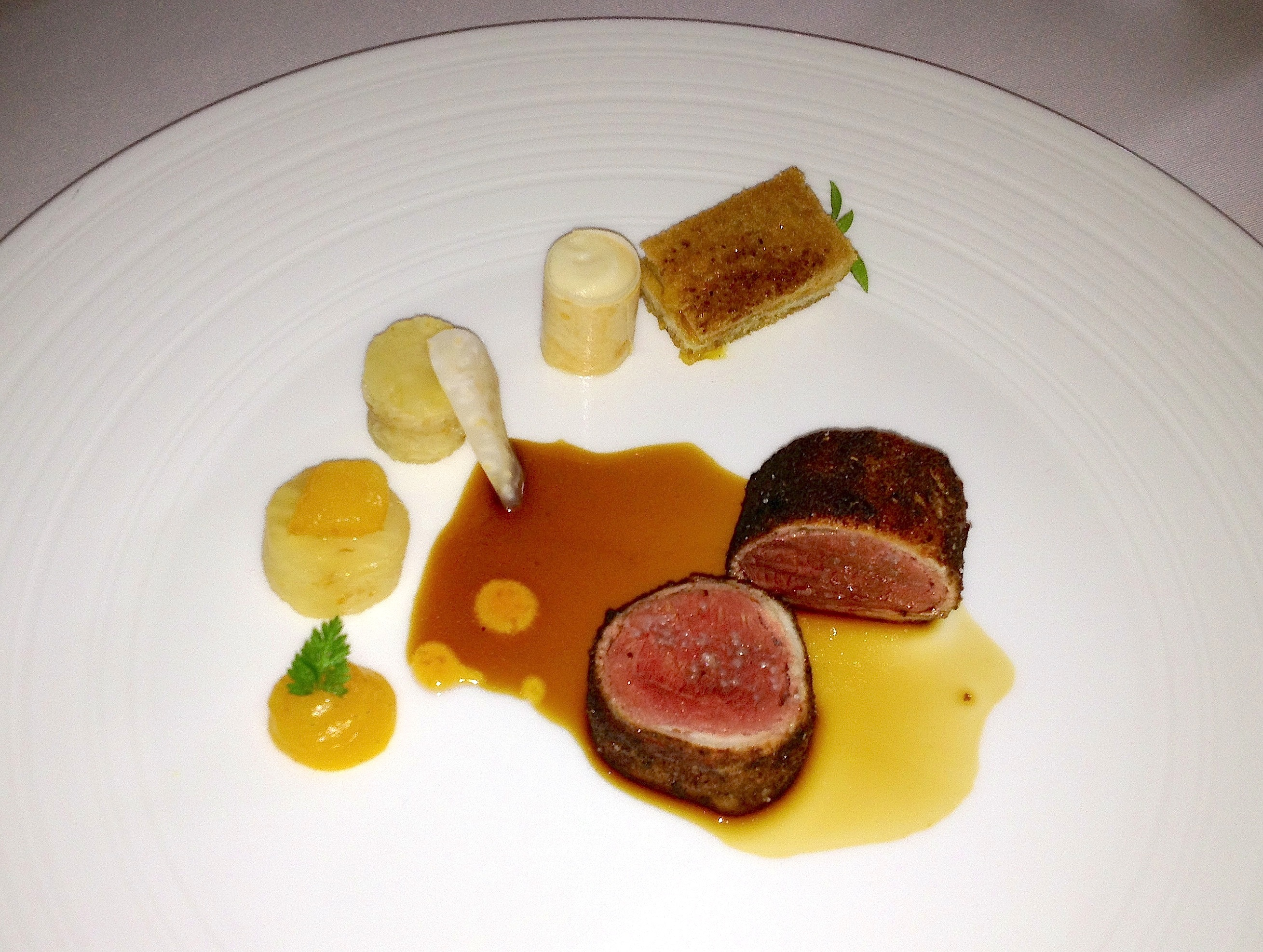 Teller im Restaurant